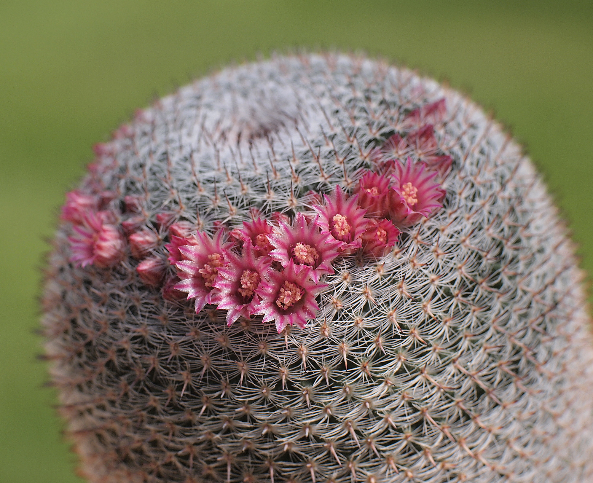 Mammillaria pseudoperbella